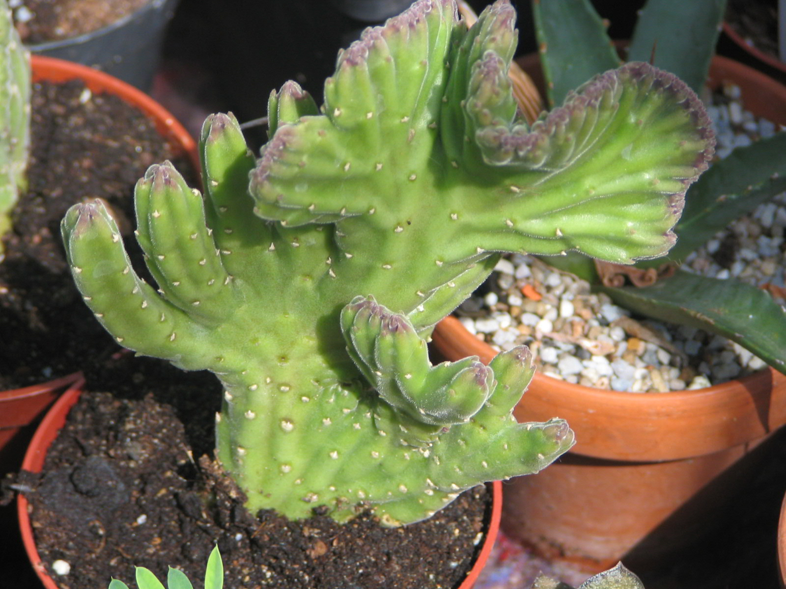 Eigen foto. Stapelia cristaat. GerardM 26 mei 2004 09:26 (CEST)